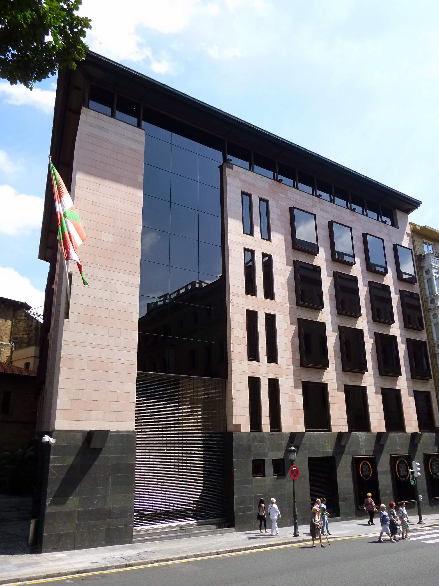 Sabin Etxea, sede del PNV, en Bilbao